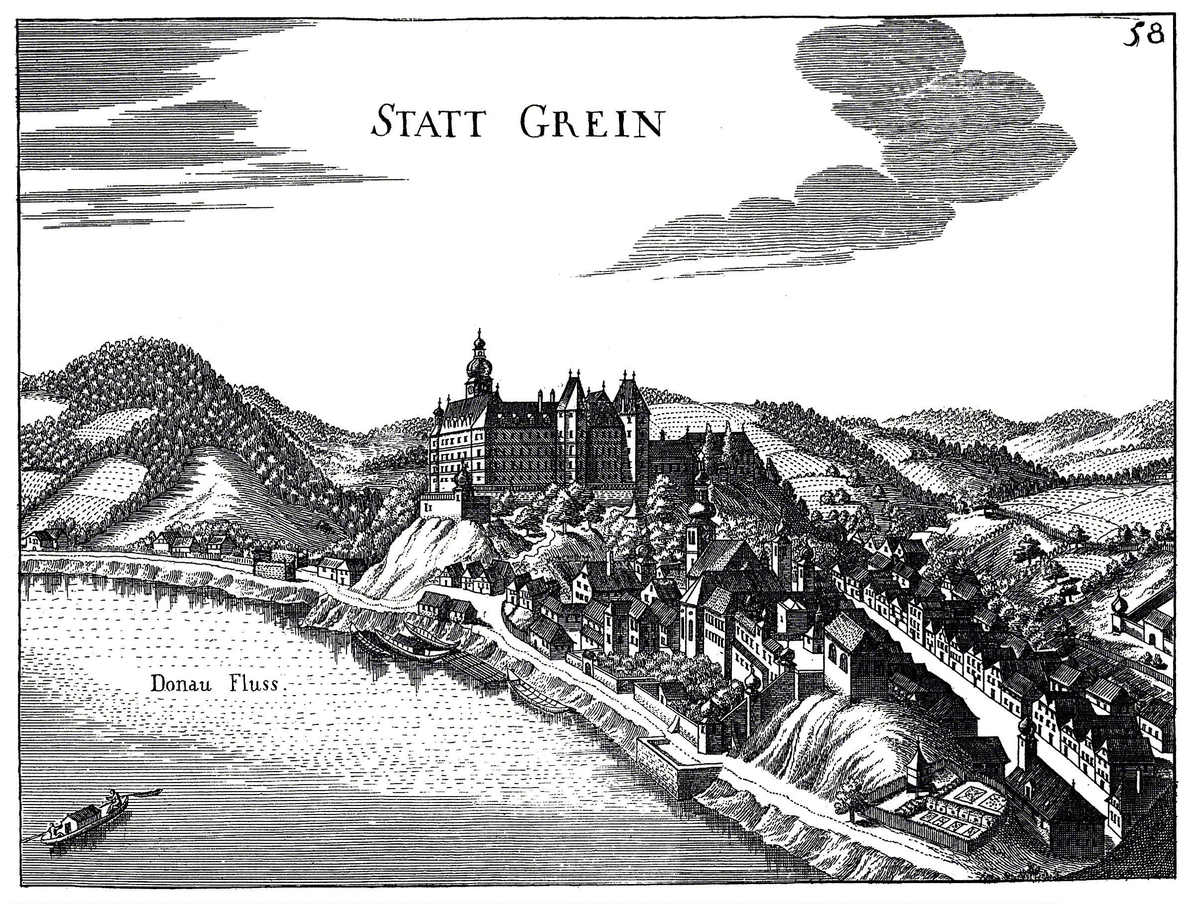 Ansicht der Stadt Grein. Kupferstich aus Georg Matthäus Vischers Topographia Austriae superioris modernae